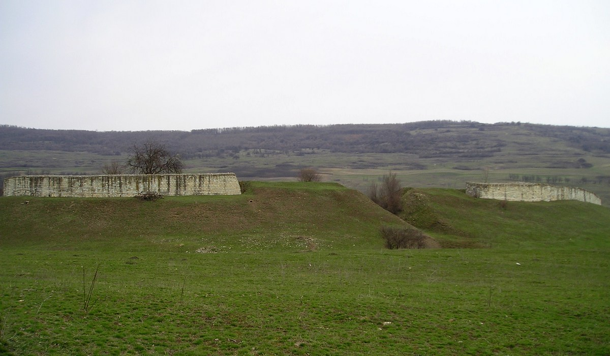 Așezare fortificată cu zid de incintă din piatră 03